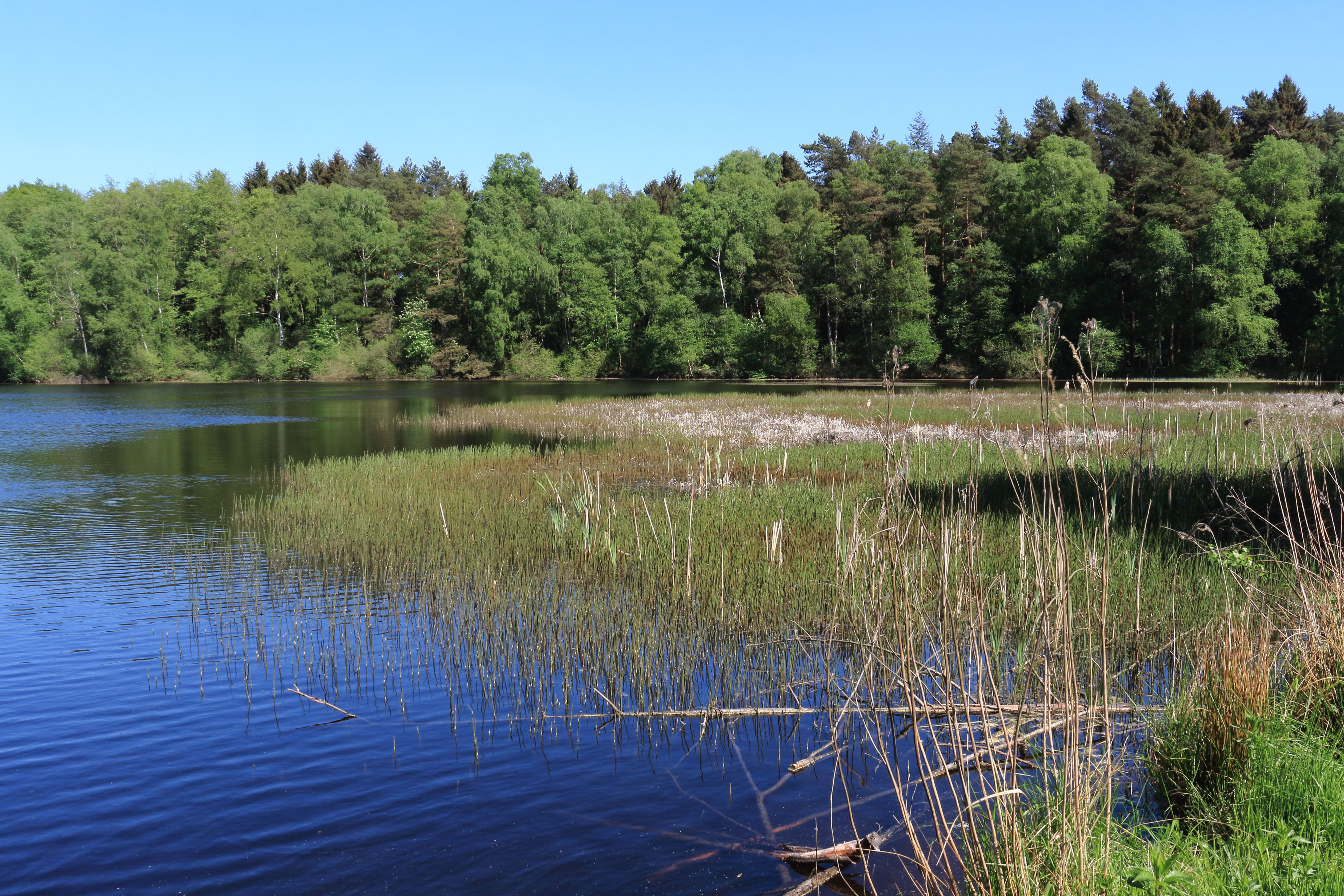 FFH-Gebiet „DE-3326-331 Henneckenmoor bei Scheuen“ und Naturschutzgebiet „NSG LÜ 00324 Henneckenmoor bei Scheuen“